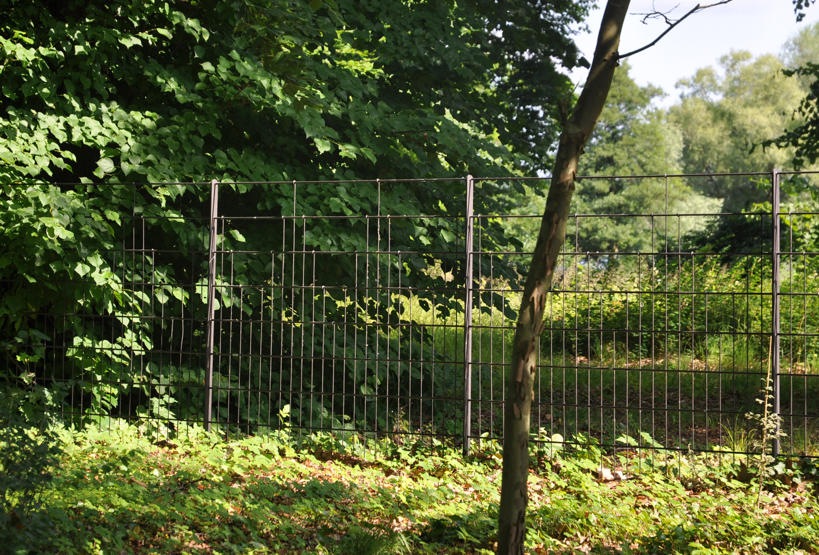 Invisible Fence zwischen Casino und Klosterhof